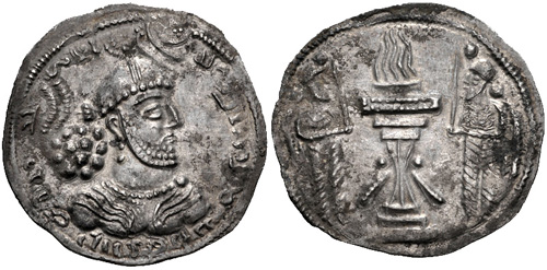 Dracma do xá Artaxes IICoins of Ardashir II